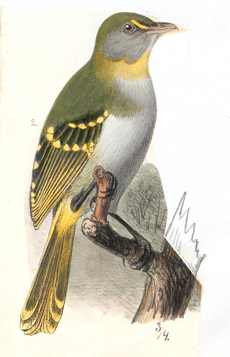 Der Vortragende charakterisirt ferner eine neuentdeckte Art aus der Familie der Buschwürger, unter dem Namen Nicator Vireo n. sp. (Tab. II. Fig. 2.) Diese Art ist dem N. chloris (Val.) ungemein ähnlich, unterscheidet sich aber von letzterem durch die viel geringere Grösse, durch aschgraue Stirn, Wangen und Kinn und durch gelben Augenstreif und Kehlfleck. "schnabel hellhornfarben; Firste dunkler; Füsse blaugrau; Iris hellbraun; 2 ♂, erlegt am 19. Septbr. 1875." Ganze Länge etwa 71/4"; Schnabel vom Mundwinkel 21 Mm.; Flügel 71 Mm.; Schwanz 72 Mm.; Lauf 23 Mm. Der Vortragende betont ausdrücklich, dass er den Species-Namen Vireo gewählt habe, um auf die einigen Vireoninen ähnliche Schnabelform und Kopfzeichnung hinzudeuten, keineswegs aber damit ornithologische Autoritäten etwa zu der Ansicht sich verleiten lassen sollten, als könne der Vortragende eine typisch amerikanische Form mit einer afrikanische verwechseln. "Aehnliche Fälle" (aber doch nicht bei dem Vortragenden) sollen "schon öfters vorgekommen" sein wie z. B. höchst ergötzlich in Finsch und Hartlaub's Vögel Ost-Afrikas, Seite 359 bei Dryoscopus thamnophilus su lesen ist, welcher mit der Beweiskraft von 4 Ornithologen durchaus zu einem echten amerikanischen Thamnophilus gestempelt werden soll.